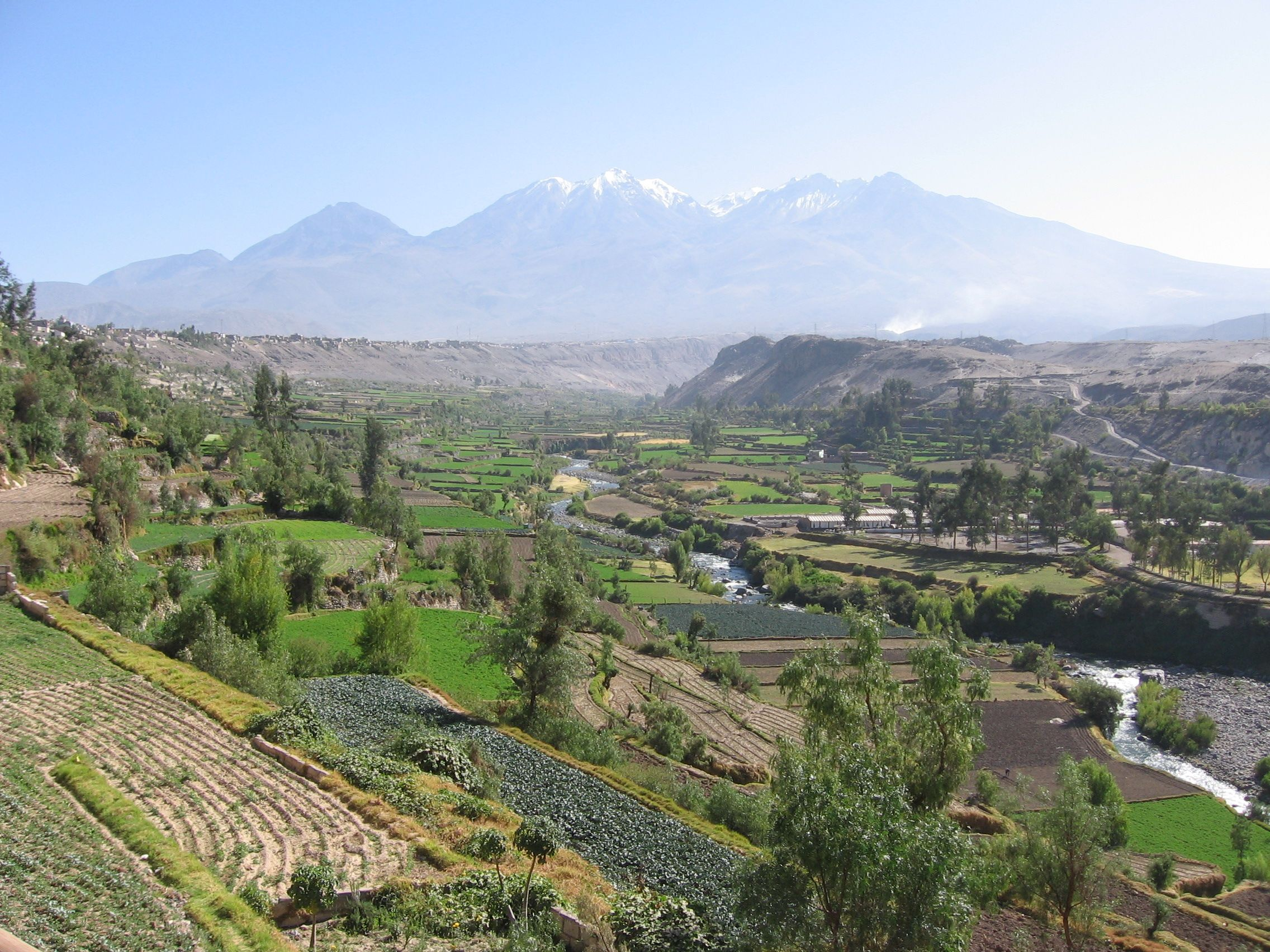 Tal der Vulkane bei Arequipa: links Misti, dann Nevado Chachani (6075m) und Picchu Picchu